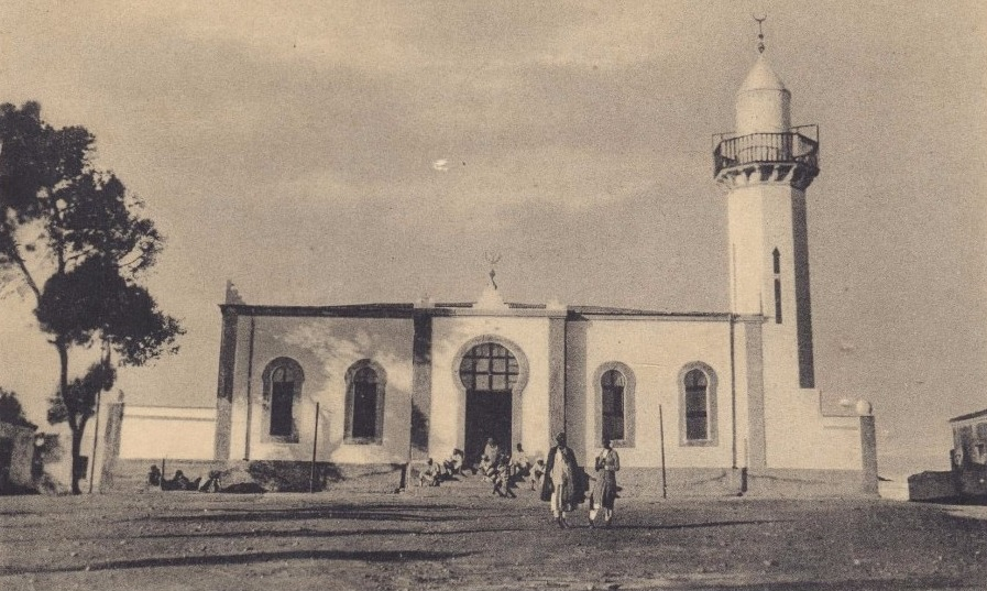 La vecchia moschea di Asmara, costruita nel 1906 e demolita nel 1937 per far posto alla Grande Moschea progettata da Guido Ferrazza